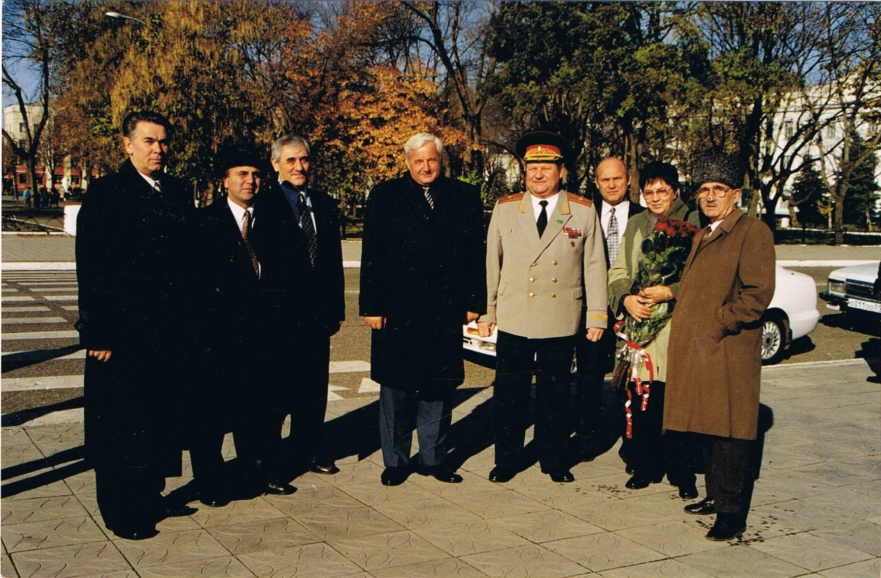 Николай Игнатович Кондратенко на 10-летии Республики Адыгеи. Майкоп 5 октября 2001 год.